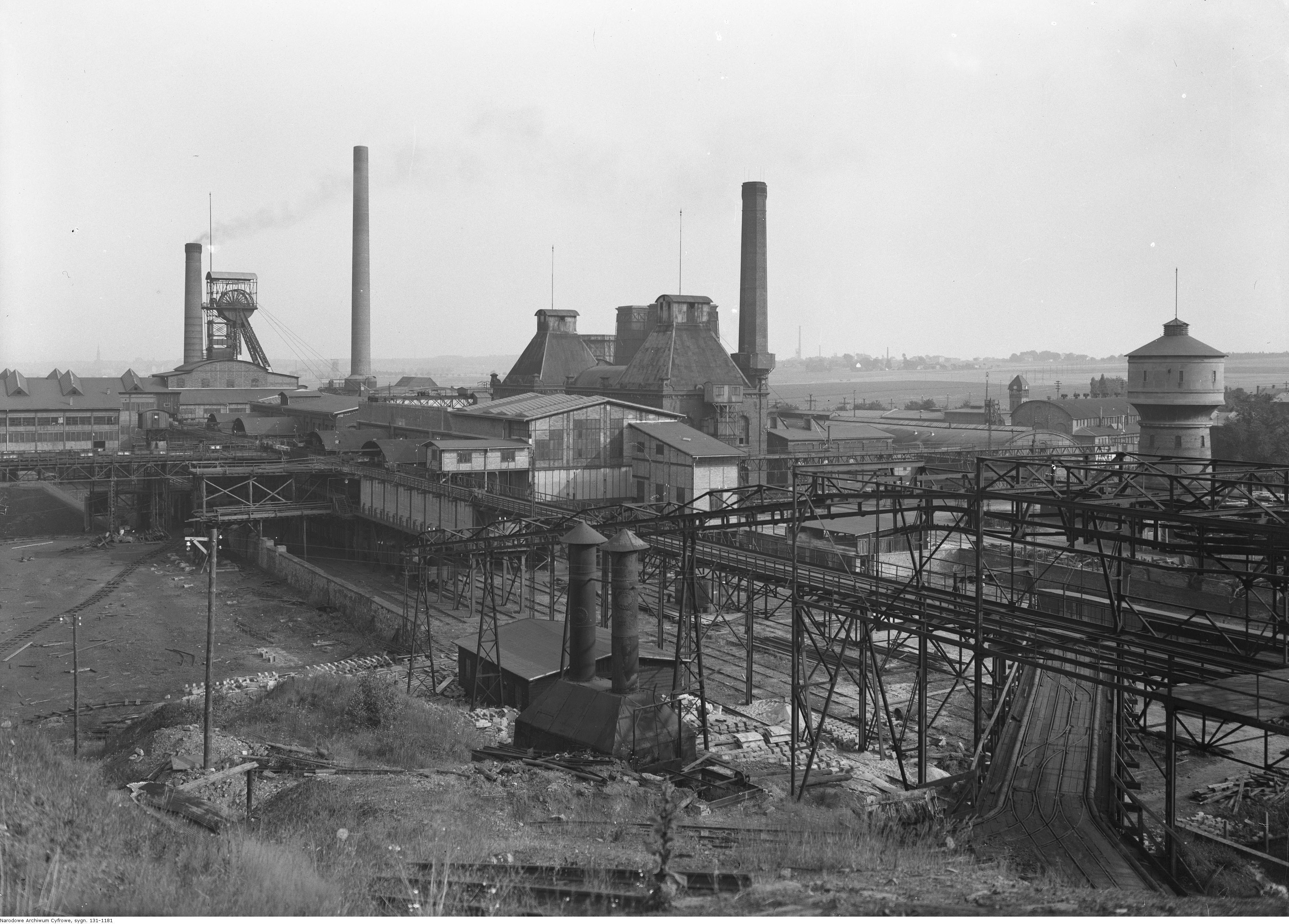 Widok z góry.